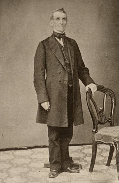 Louis Massue